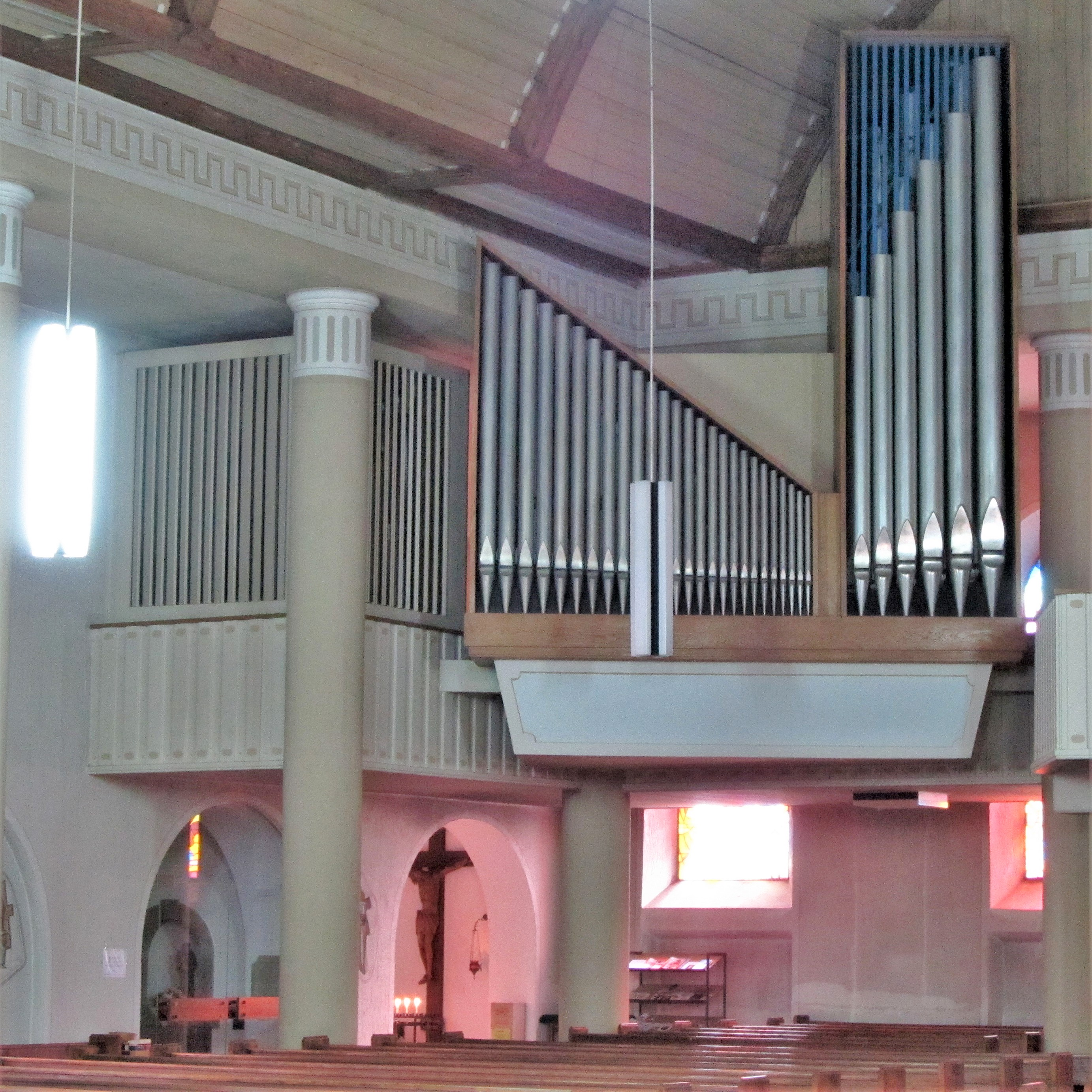 Orgelprospekt der katholischen Pfarrkirche Herz Jesu in Oberwürzbach, Saarland